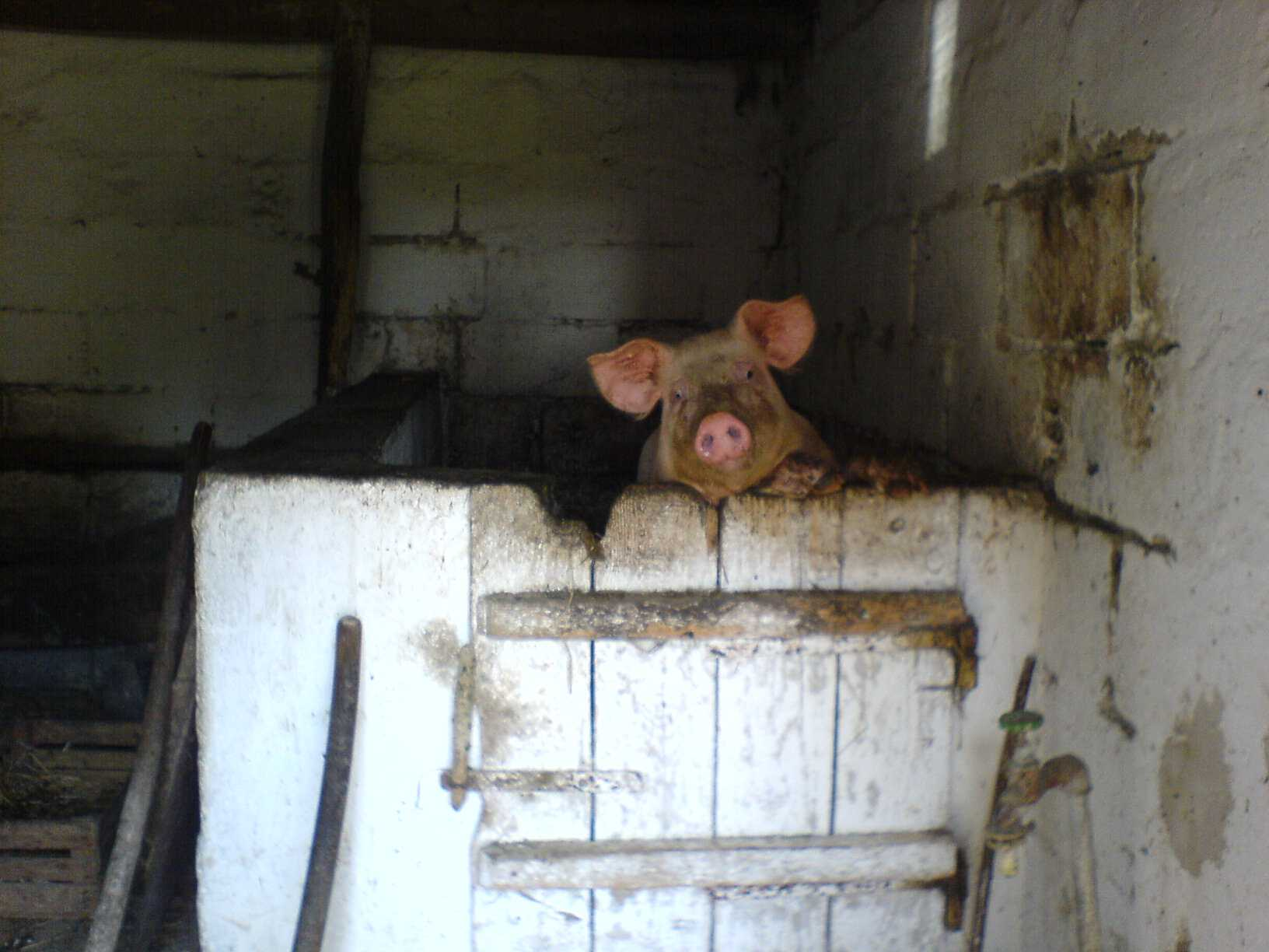 Chlew